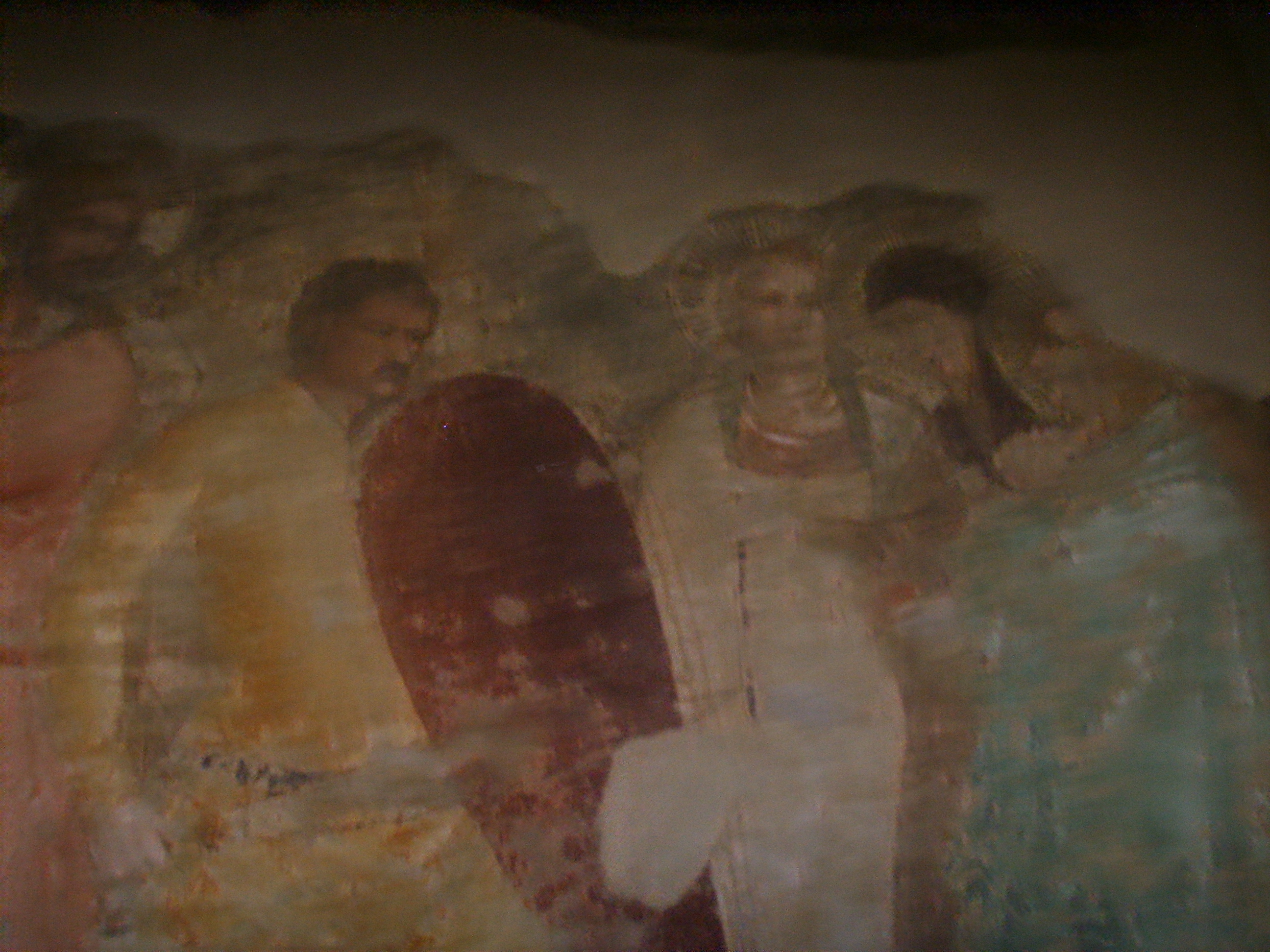 Badia Fiorentina church nardo_di_cione_(attribuzione),_cappella_di_san_bernardo in Florence, italy